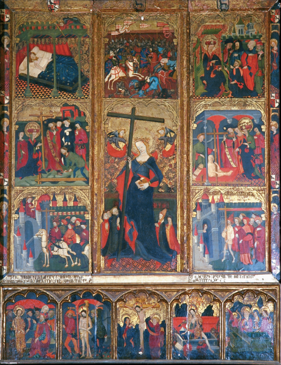 Santa Elenaren erretaula Lizarrako Migel santuaren elizan